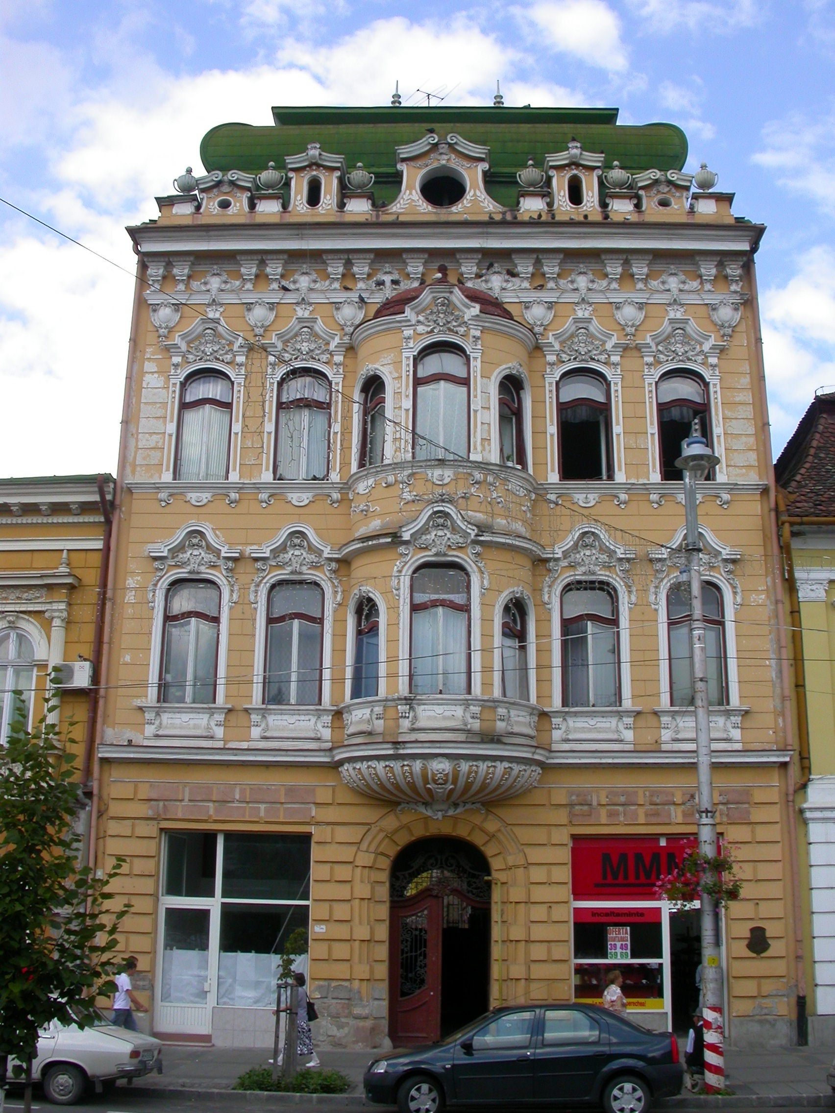 Casa Banyai, 1904